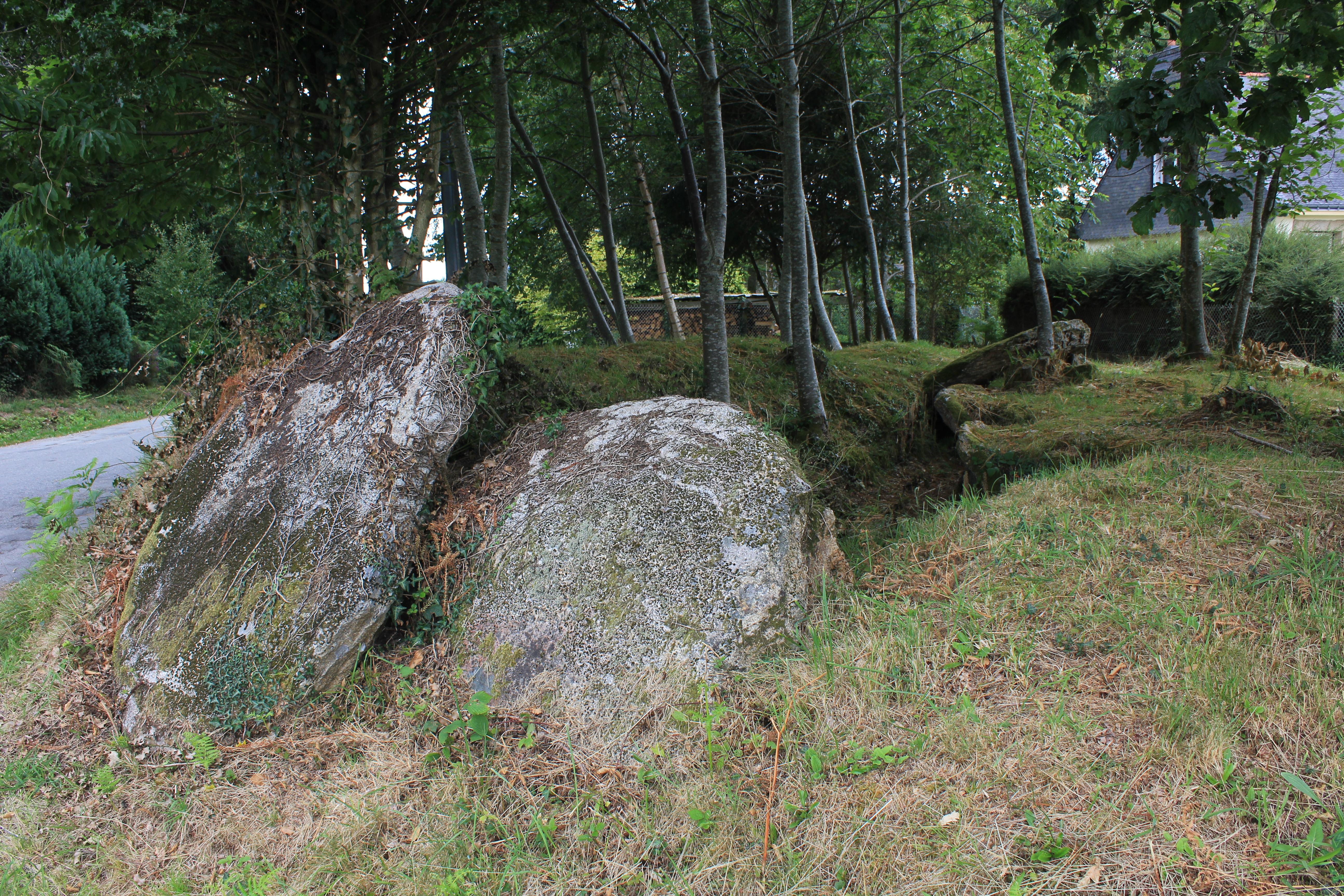 Allée couverte de Lann-et-Vein .